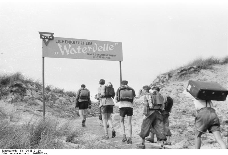 CVJM Ferienlager "Waterdelle" des Evangelischen Jungmännerwerkes Deutschlands